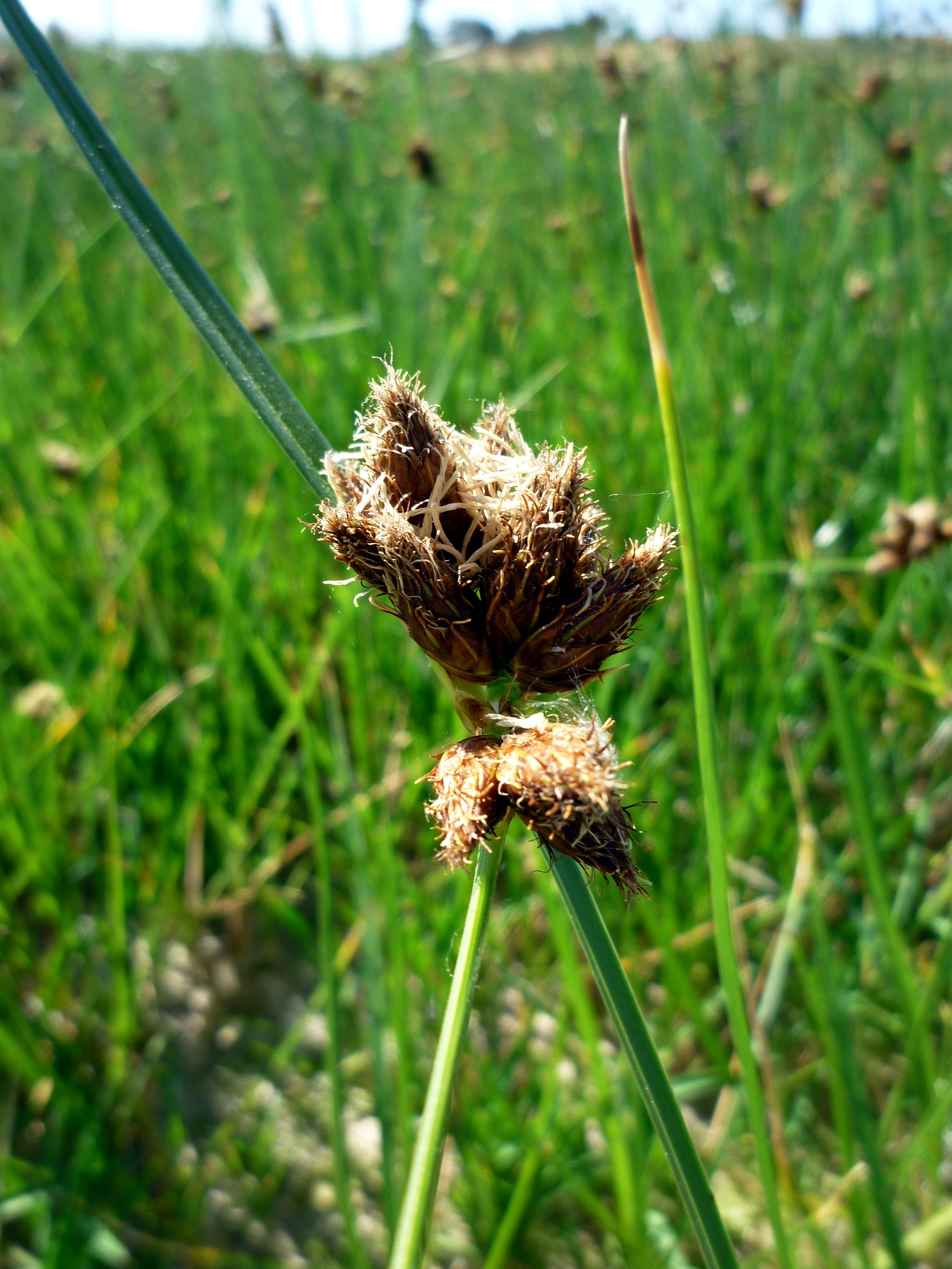 Clot dels Reguers (els Plans de Sió): jonca marina, vegetació típica This is a a photo of a wetland in Catalonia, Spain, with id: IZHC-18003201